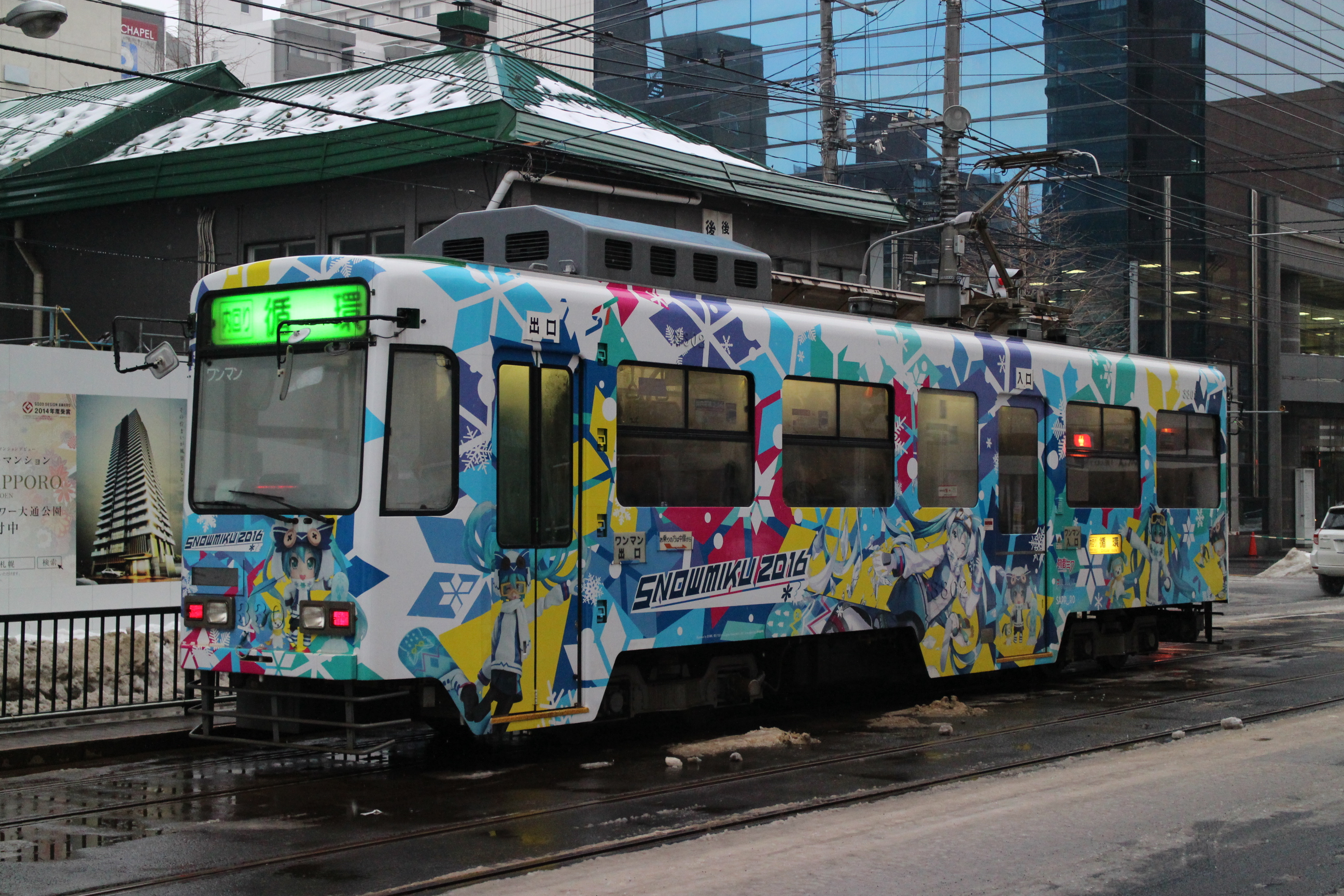 札幌市交通局3300形電車 「雪ミク」ラッピング